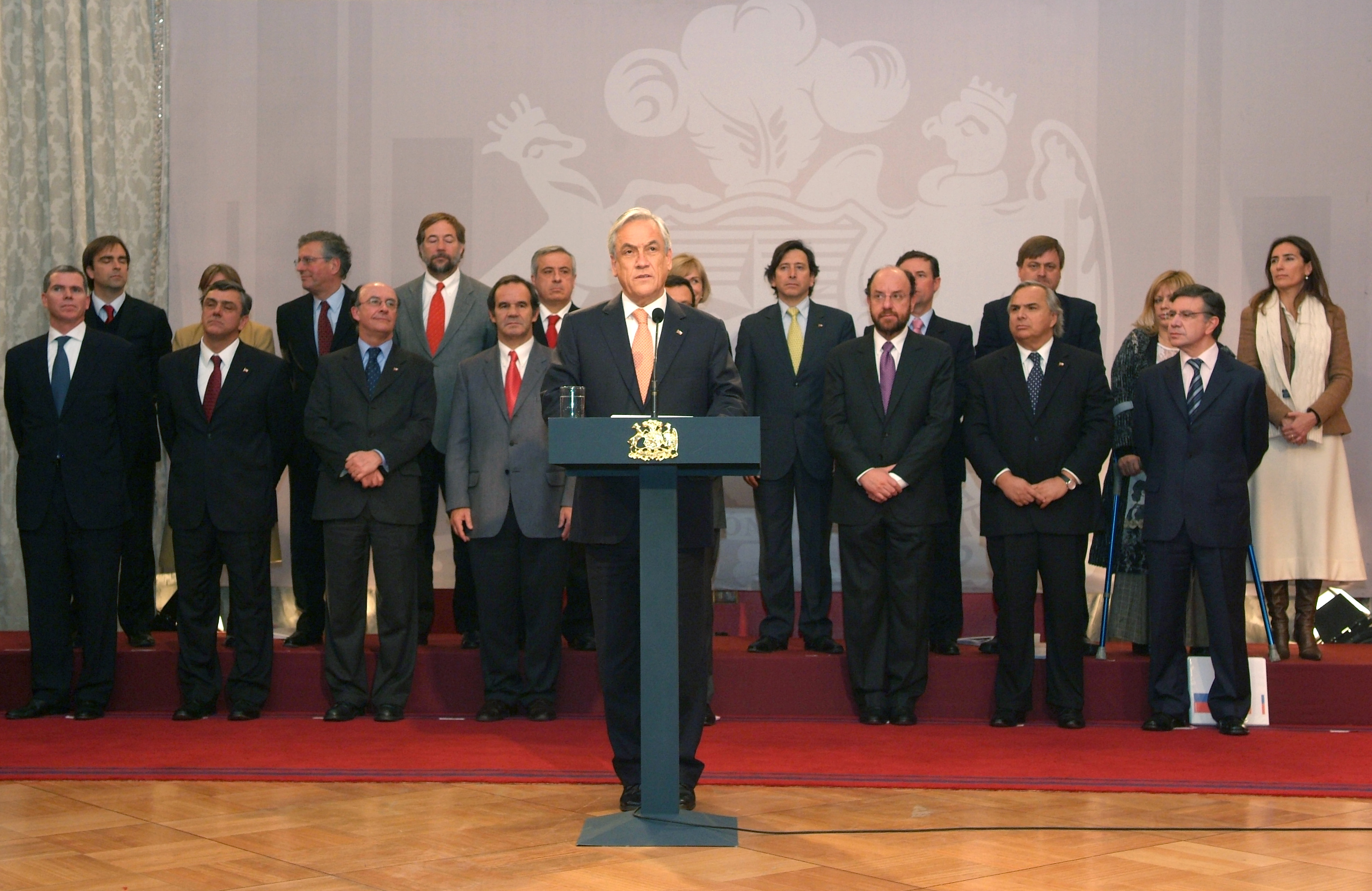 El Presidente de la República, Sebastián Piñera, encabezó la ceremonia de juramento del nuevo Ministro Secretario General de Gobierno,Andrés Chadwick.Palacio de La Moneda.